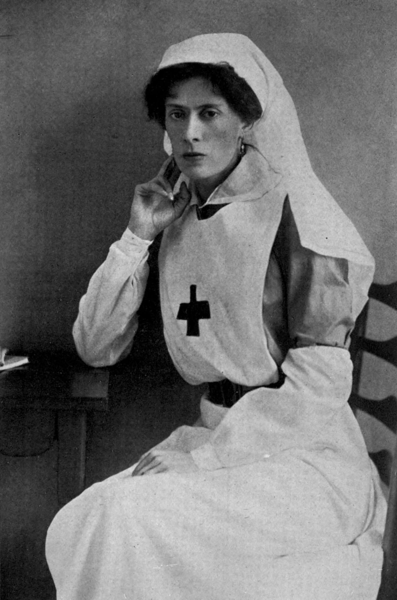 LADY RALPH PAGET OF ENGLAND (Louise Paget)